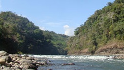 Lugar posible construcción PH el Diquís